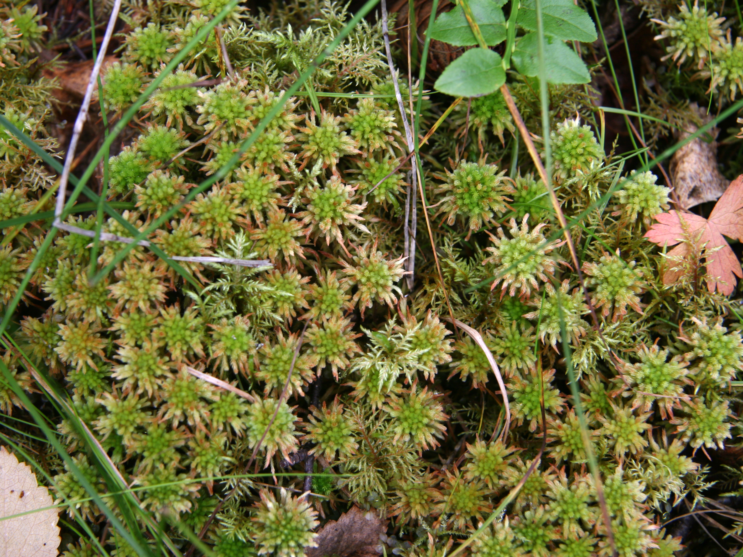 Bollvitmossa